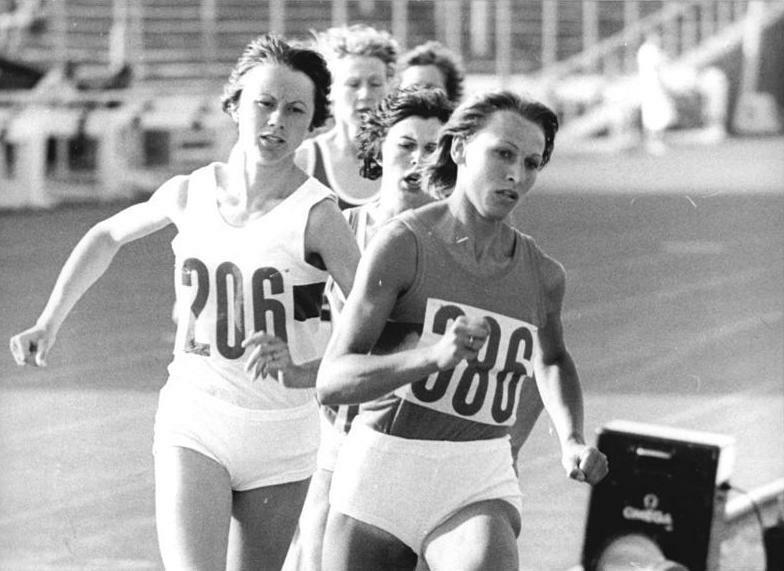 Anita Weiß, Wartenberg ADN-ZB Thieme 26.5.79 Karl-Marx-Stadt: Beim DDR-Klubpokal der Leichtathleten am 26.5.79 in Karl-Marx-Stadt siegte über 800 m Anita Weiss (ß) -rechts- vom SC Neubrandenburg vor der Hallenserin Wartenberg in einer Jahresweltbestzeit von 1:59,50.